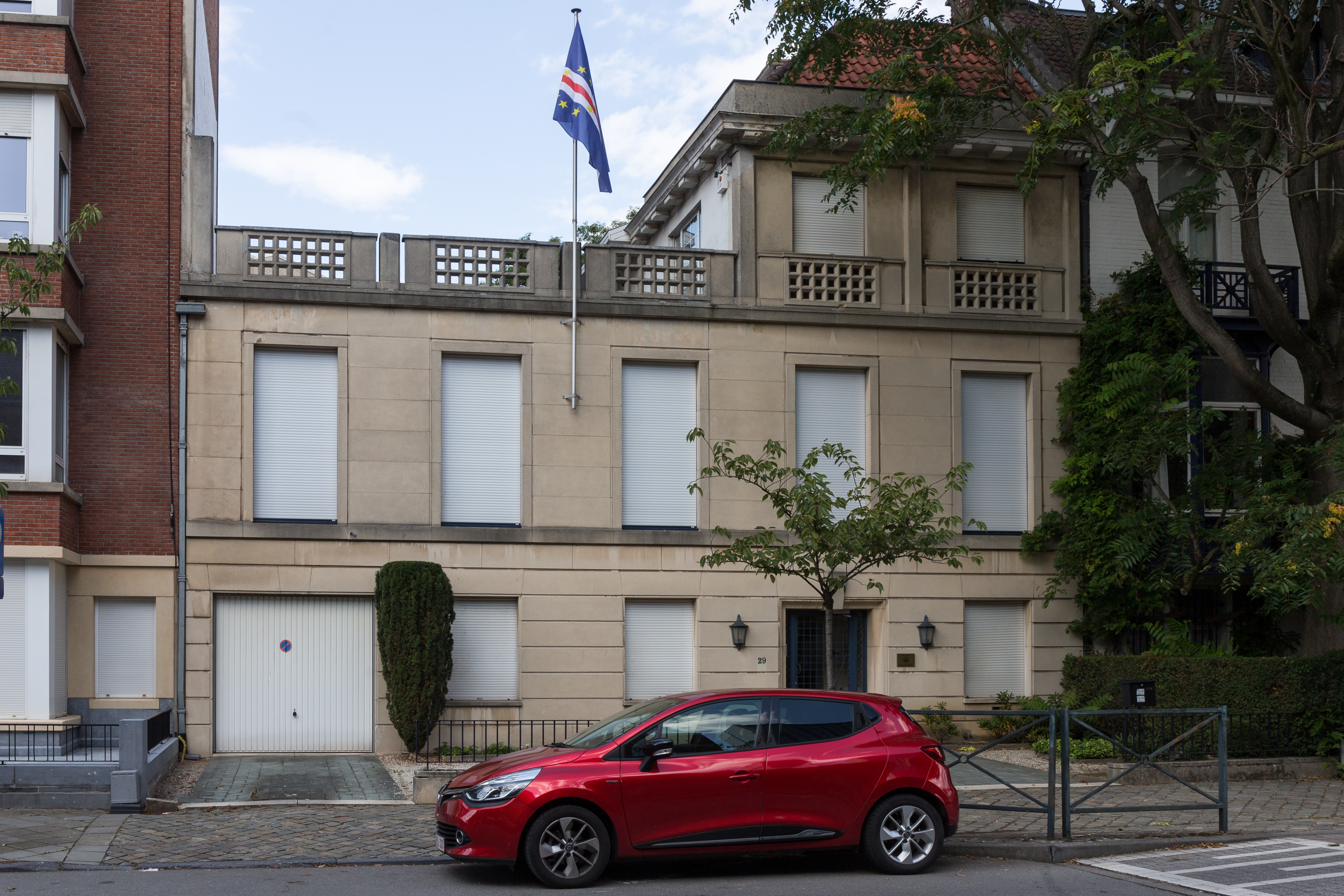 Ambassade du Cap-Vert en Belgique, Avenue Jeanne 29, Ixelles.